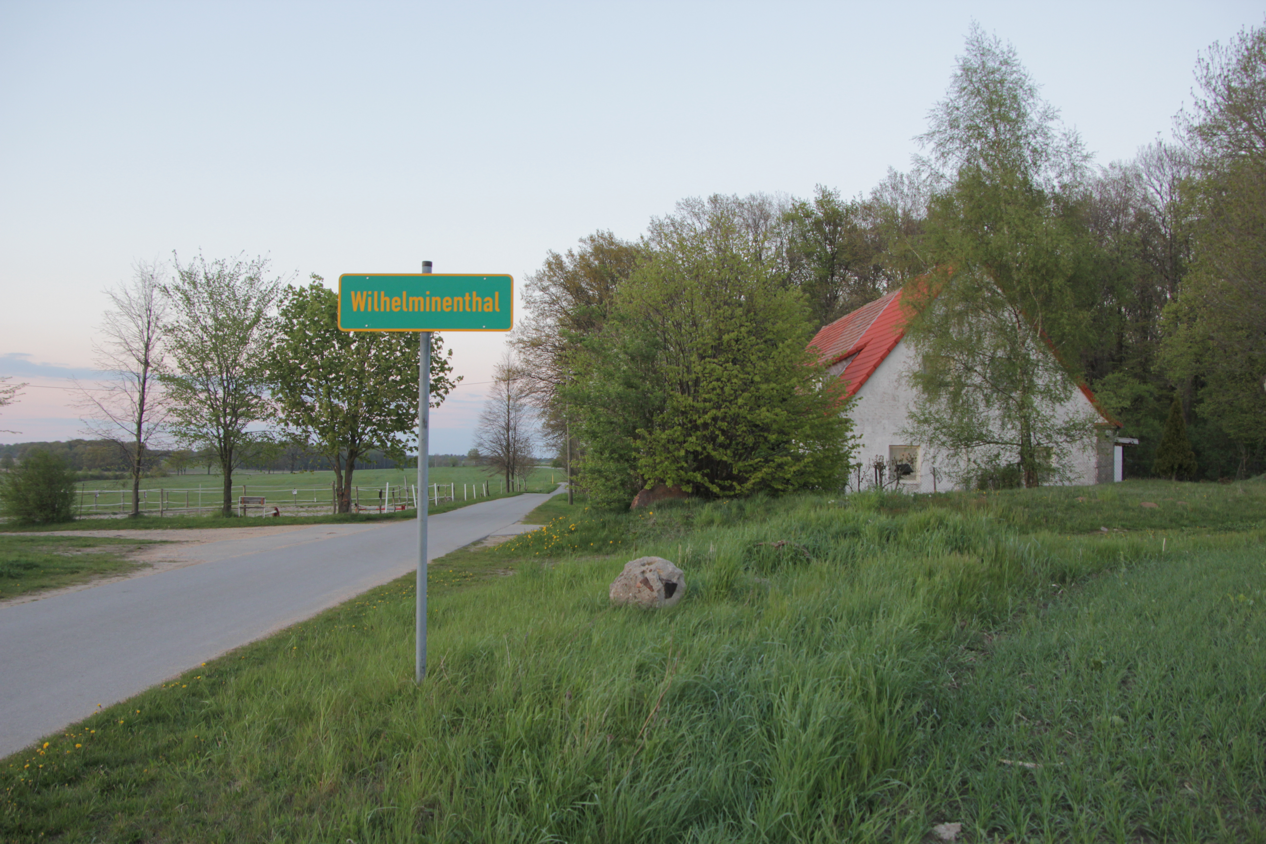 Der südliche Ortseingang von Wilhelminenthal im Abendlicht. Die Straße führt zur B115, kommend aus Ullersdorf